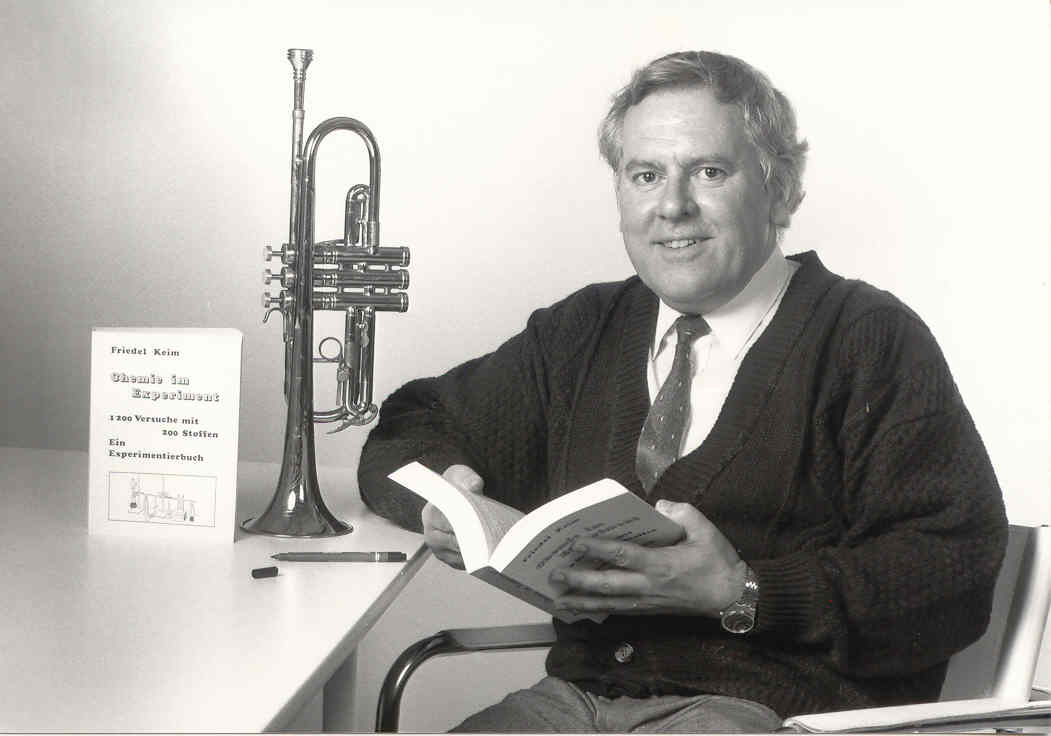 Friedel Keim mit Trompete und Chemiebuch